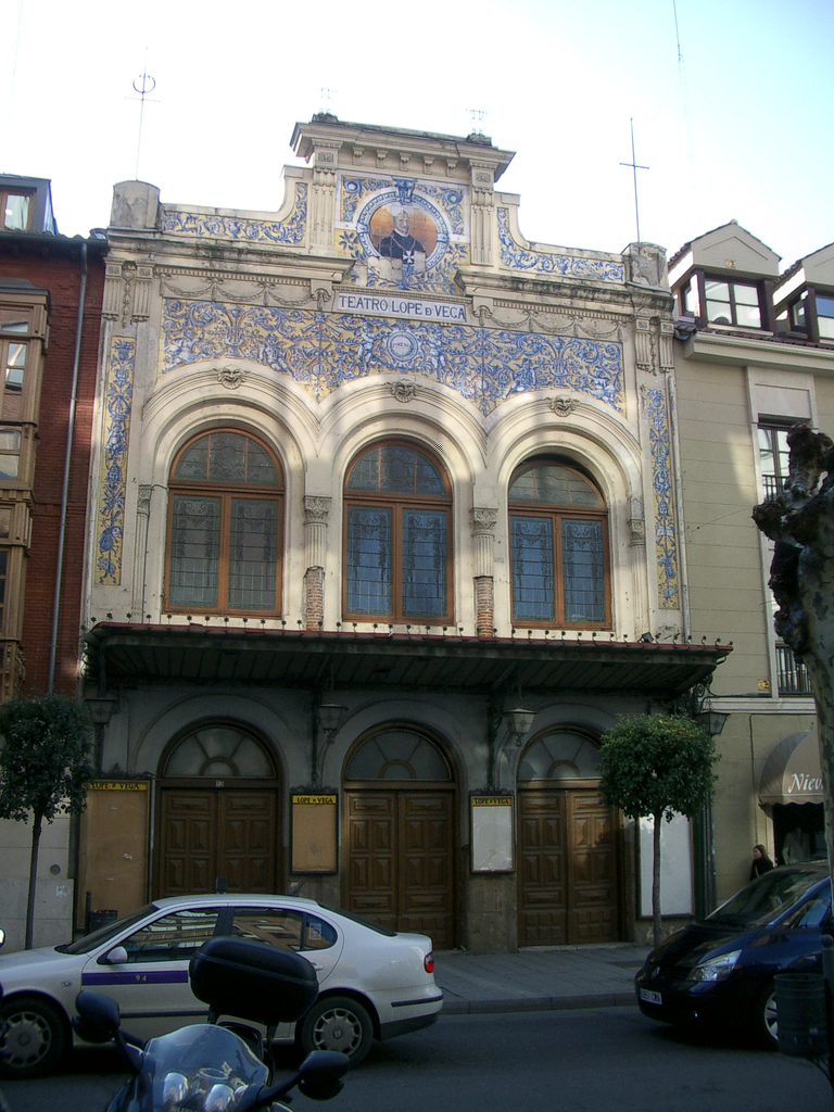 Fachada principal del teatro Lope de Vega de Valladolid en penoso estado ya en 2006.